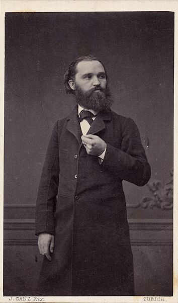 Porträt von Wilhelm Lübke